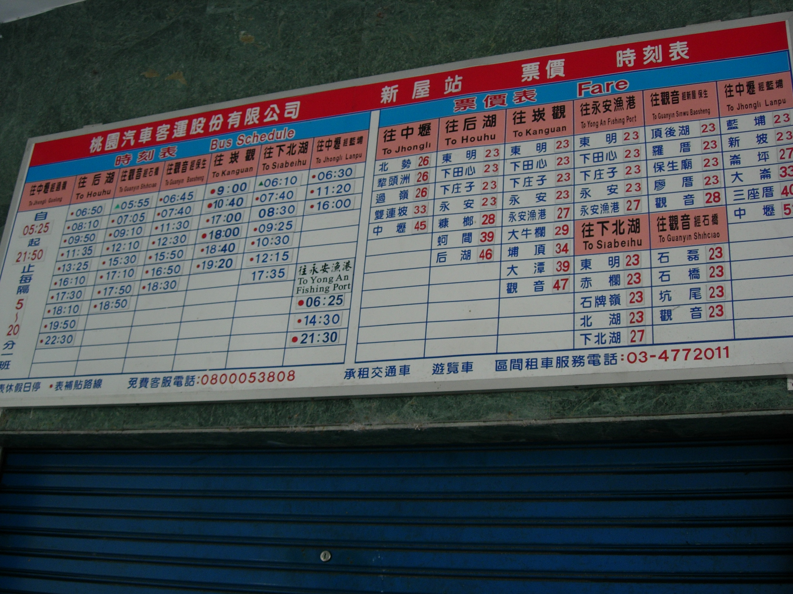 中文（台灣）: 桃園客運新屋站票價時刻表